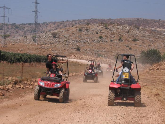 טיול טרקטרונים.